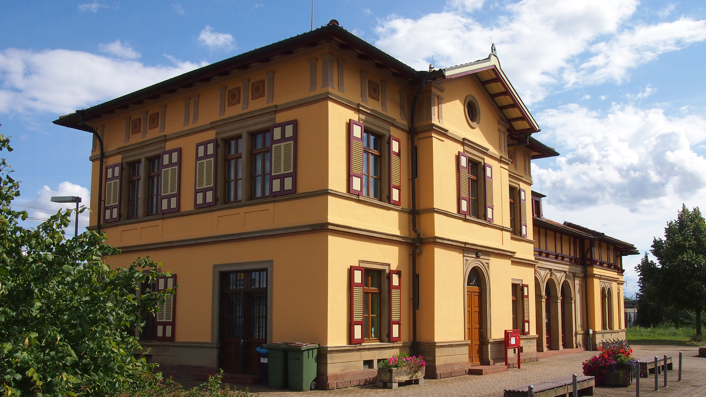 Graben-Neudorf alter Bahnhof